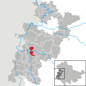 Merkers-Kieselbach in Thuringia - Wartburgkreis